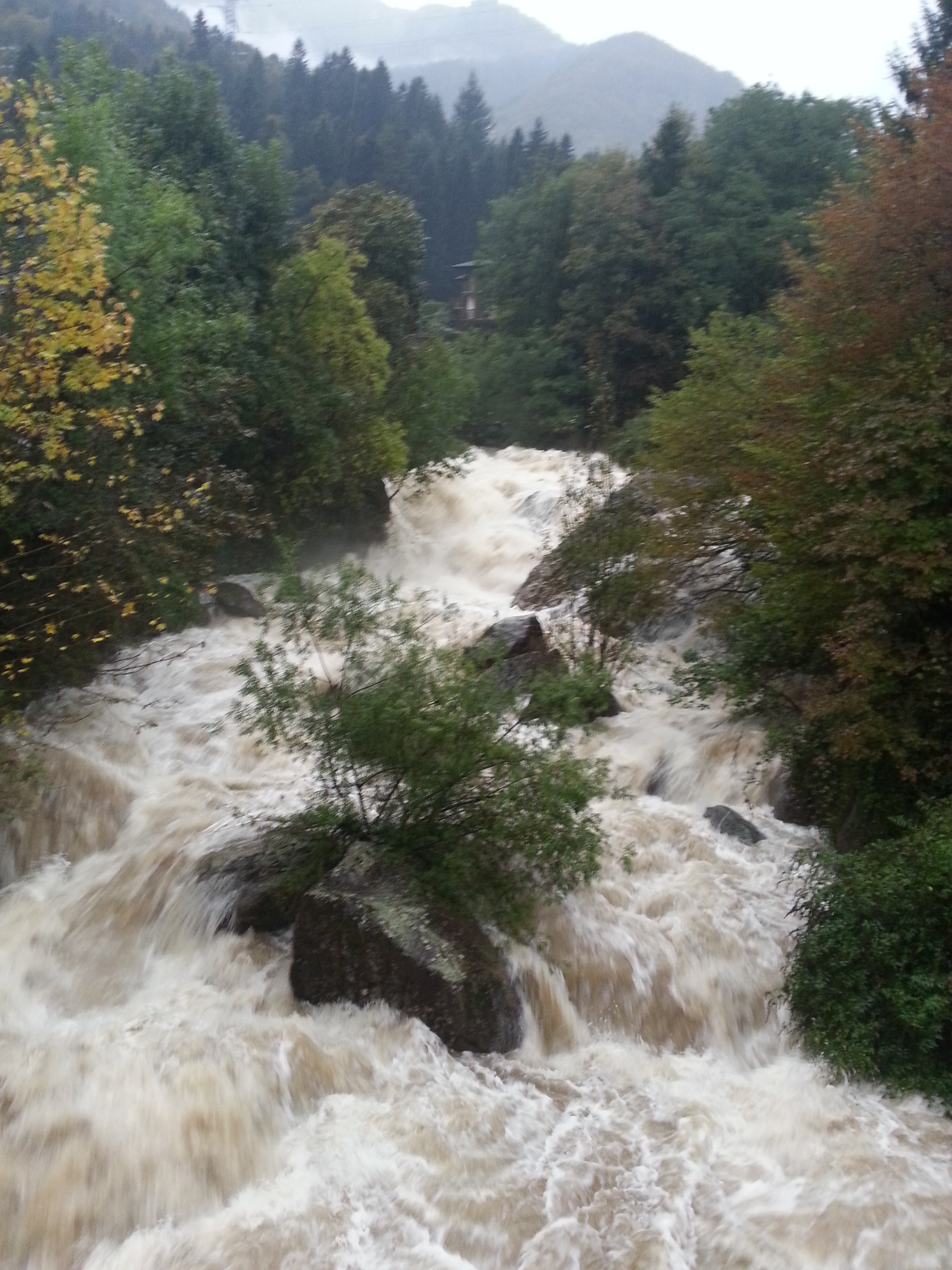 Torrente Goglio in piena -Località Pranzera, quella che un tempo era la Contrada del Goglio